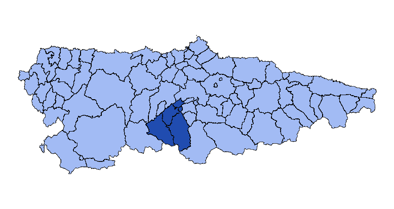 Concejos que forman la mancomunidad asturiana Valles del Oso